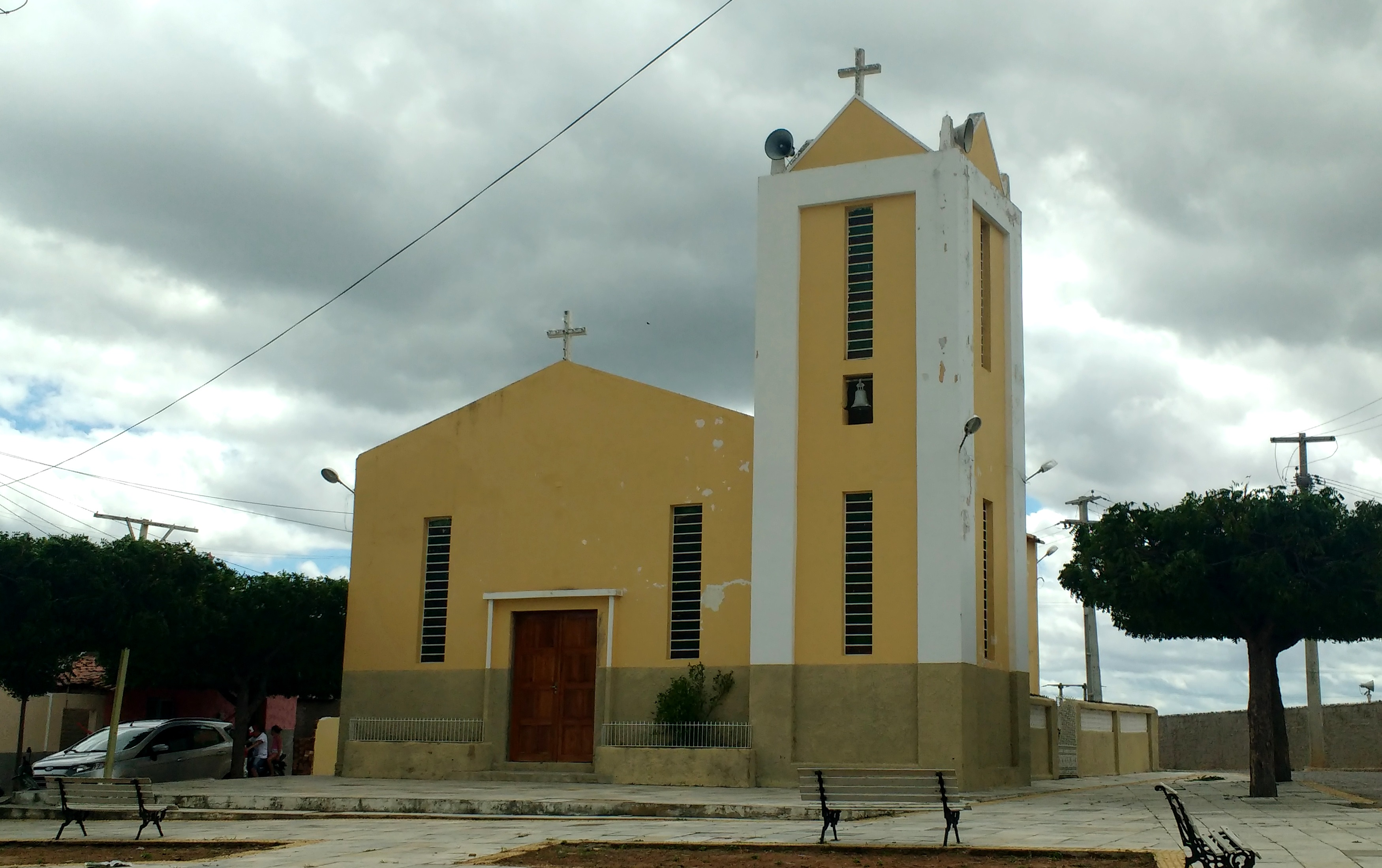 Capela São Vicente de Paulo, da paróquia de Santo Antônio, em Marcelino Vieira, Rio Grande do Norte (Brasil).